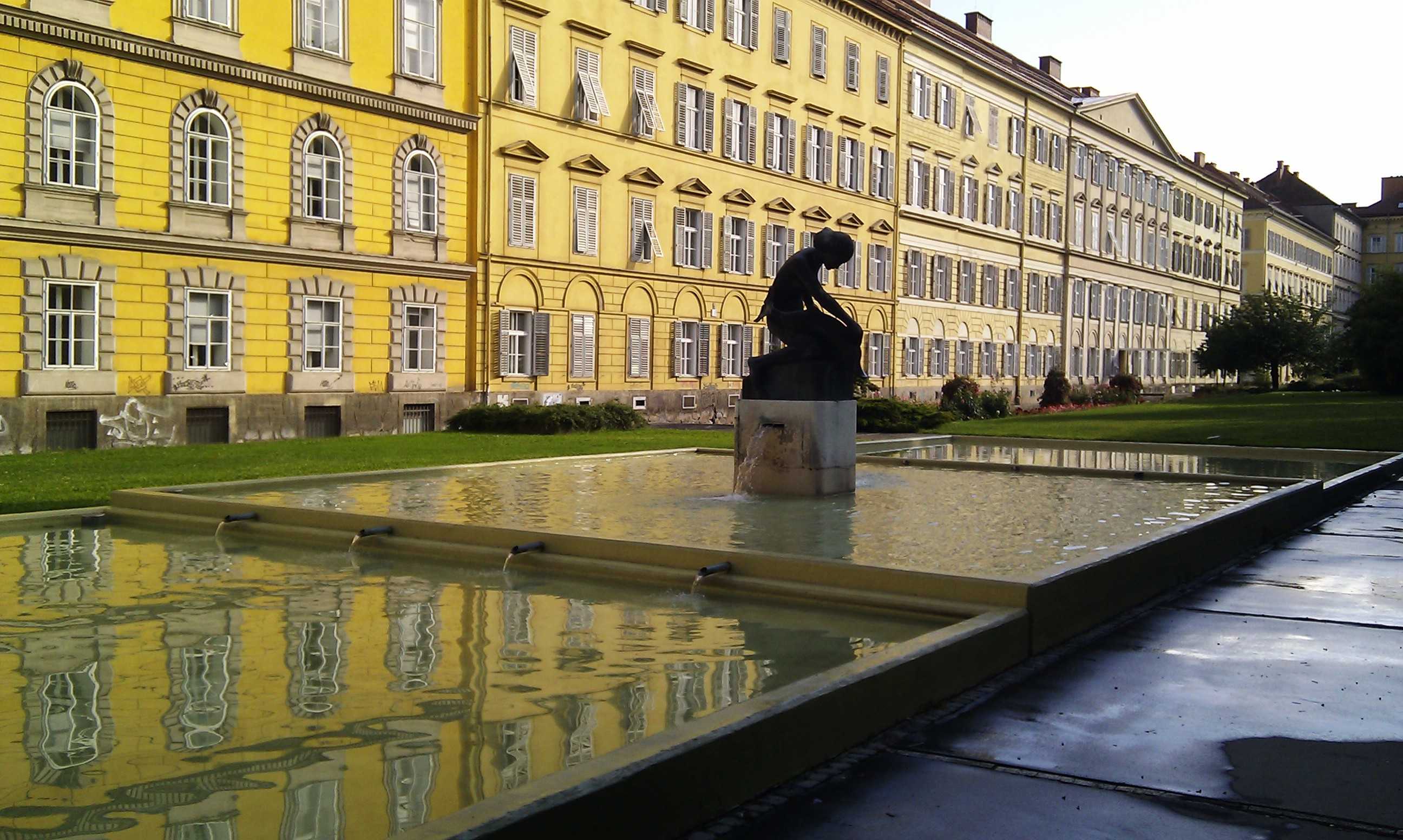 Rosariumbrunnen, Opernring, Graz